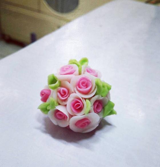 Hoa đất sét tại Nhật